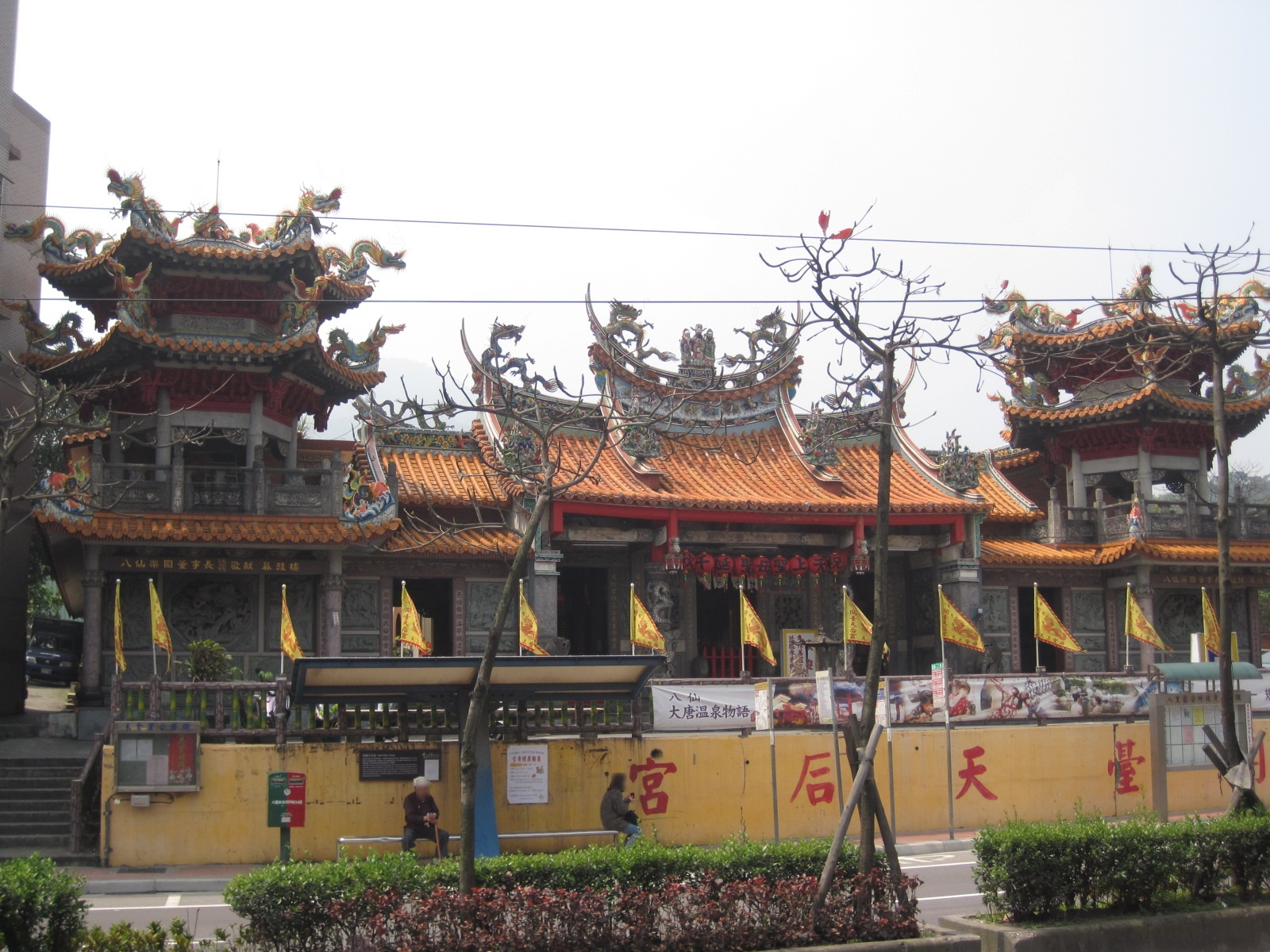 八里開臺天后宮，位於新北市八里區